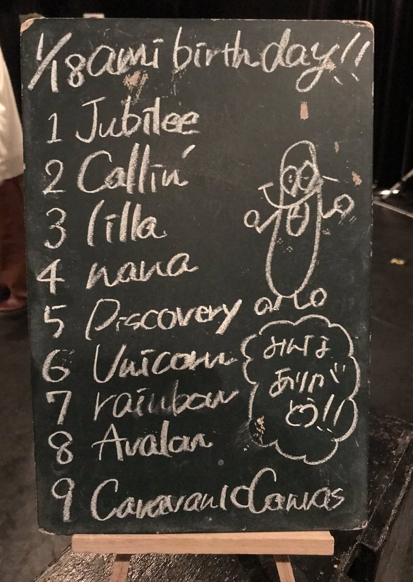 amiinAセトリボード